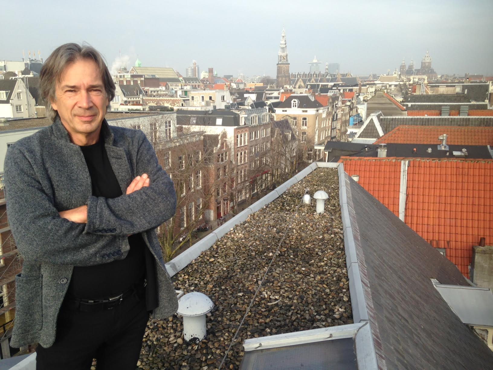 Dr. Peter Jan Margry op het dak van het Meertens Instituut in Amsterdam